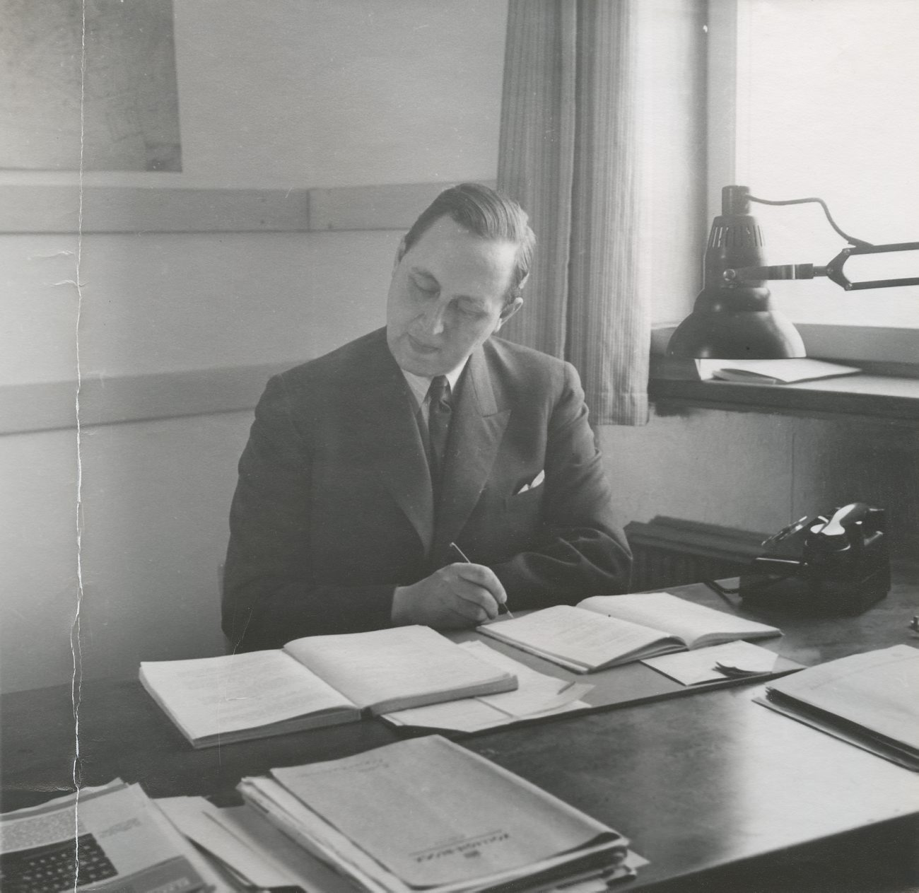 DIG93731. Professor Helmer Bäckström, på hans arbetsplats vid, institutionen för fotografi vid Kulngliga Tekniska Högskolan.